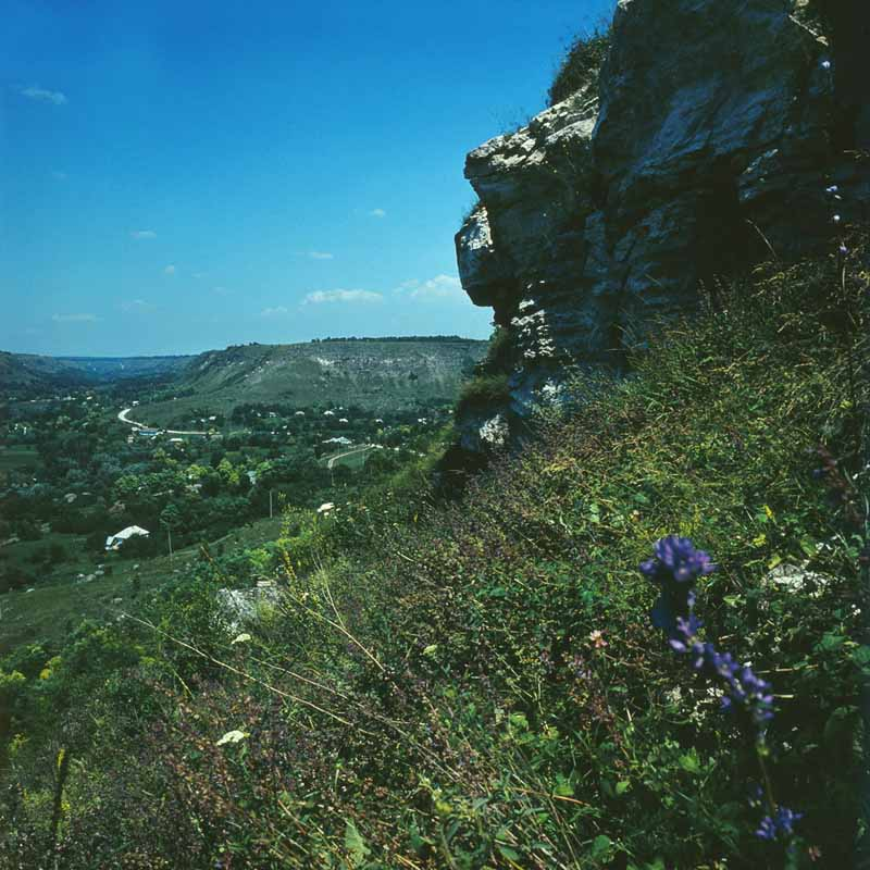 Camenca district.